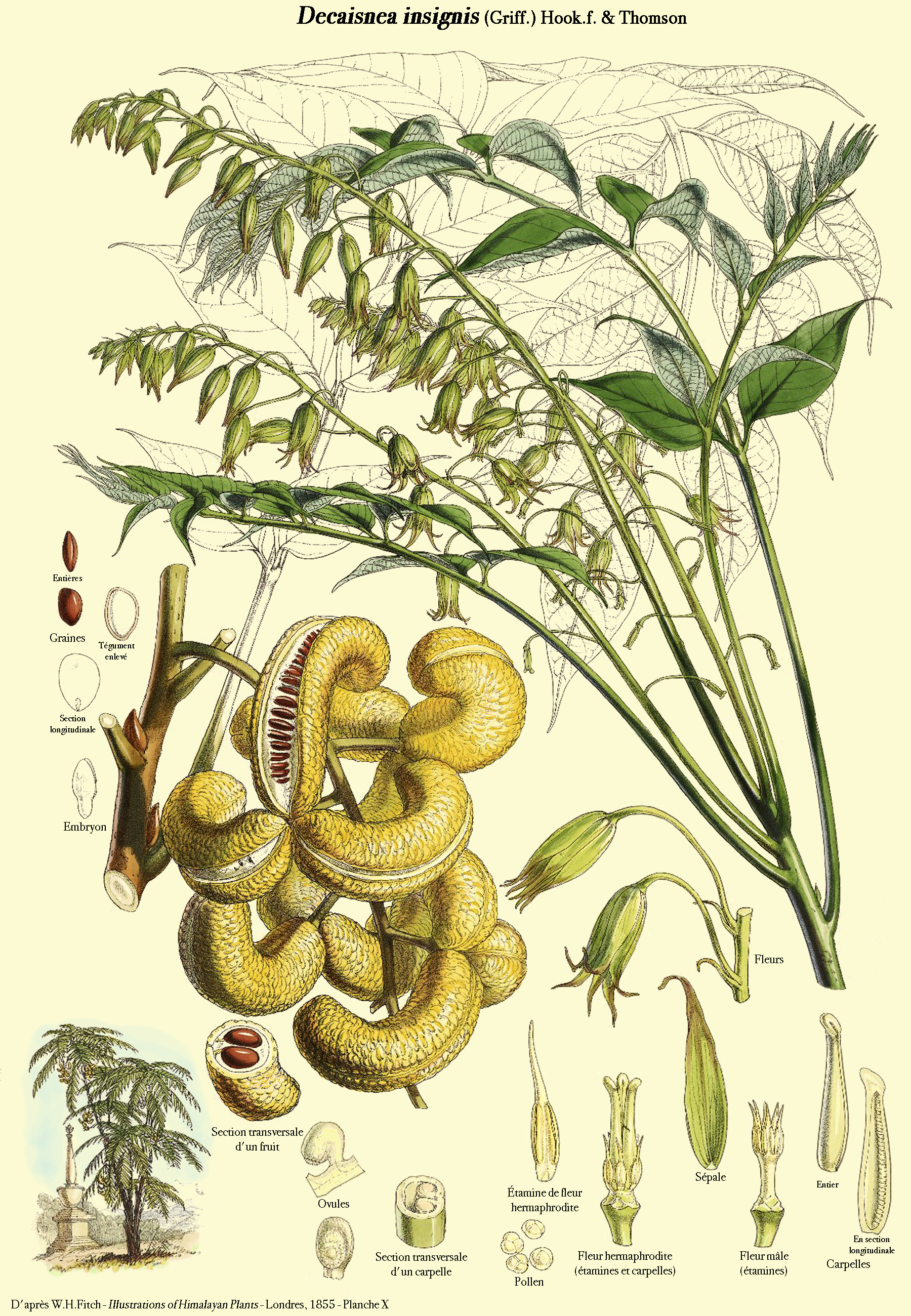 Decaisnea insignis (Griff.) Hook.f & Thomson - Planche X de Illustrations of Himalayan Plants - Londres, 1855 - Reprise par D.Prévôt